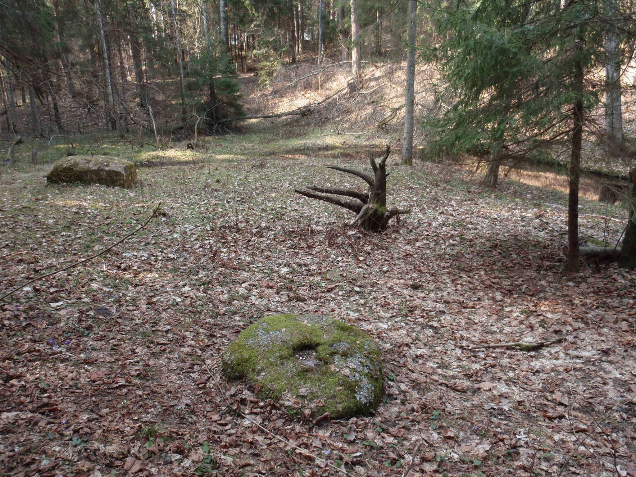 Ohvrikivi Hatiku oja ääres Kiidjärve külas